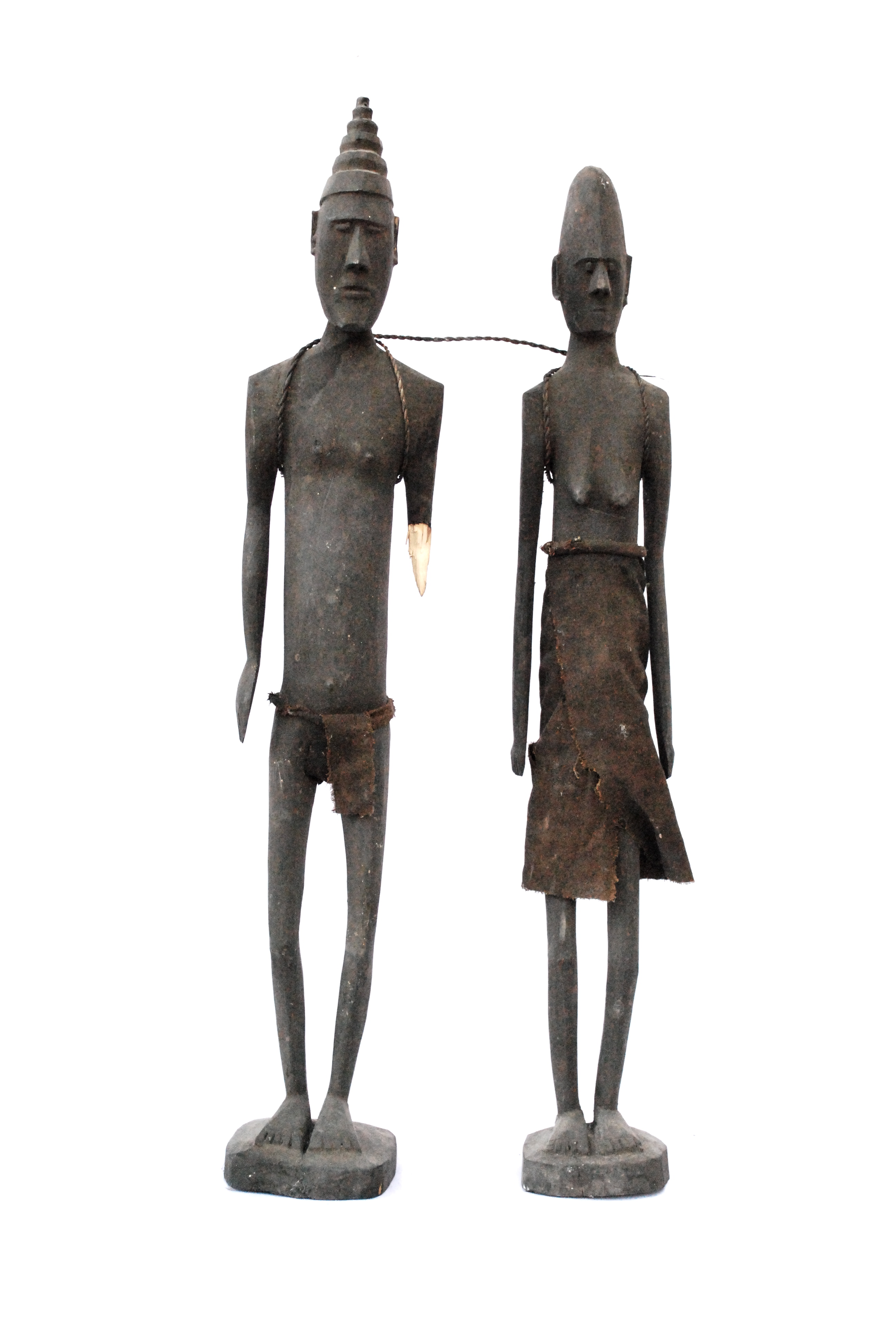 Holzschnitzkunst aus Maquili